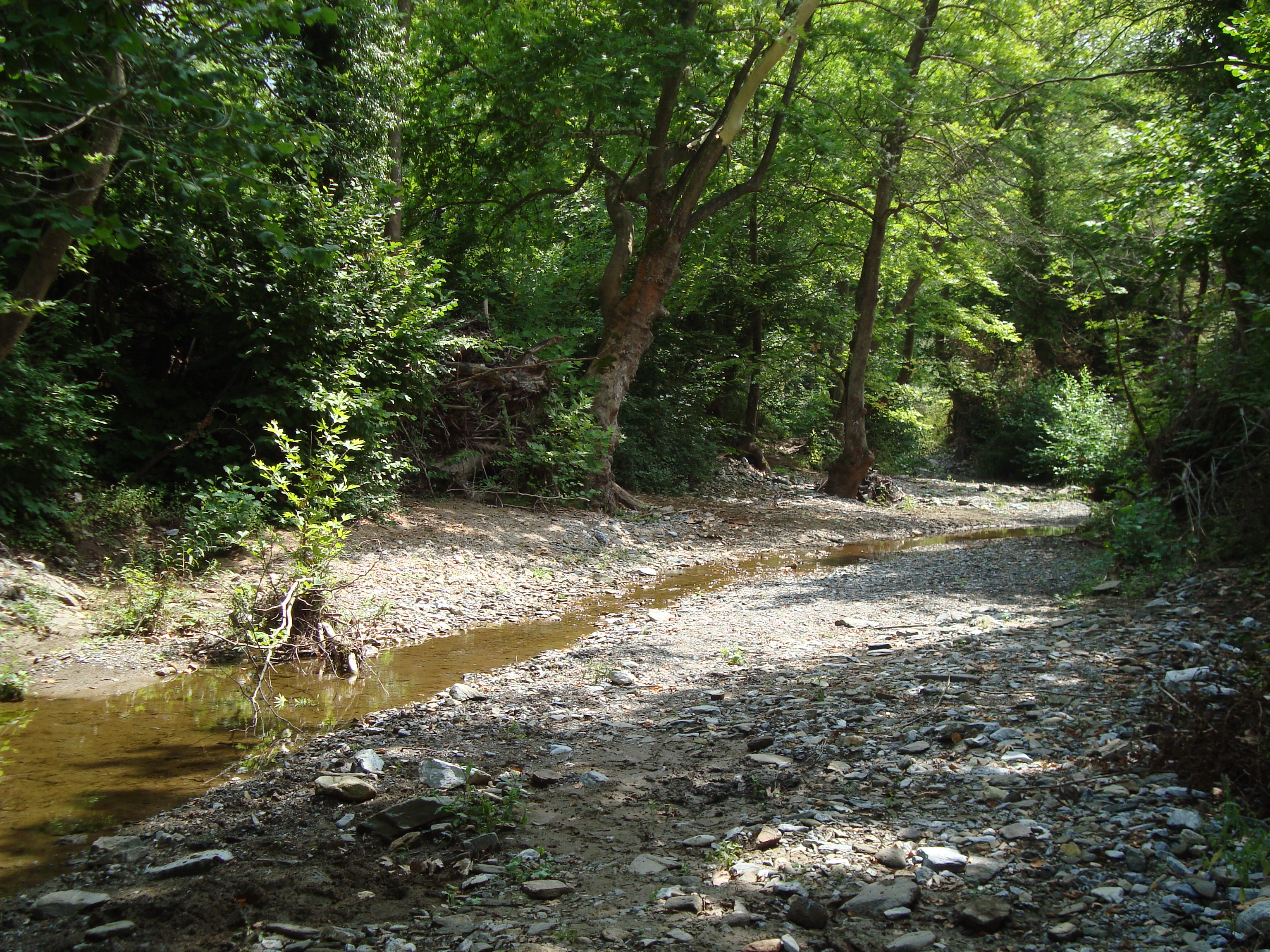 δάσος βαρβάρας